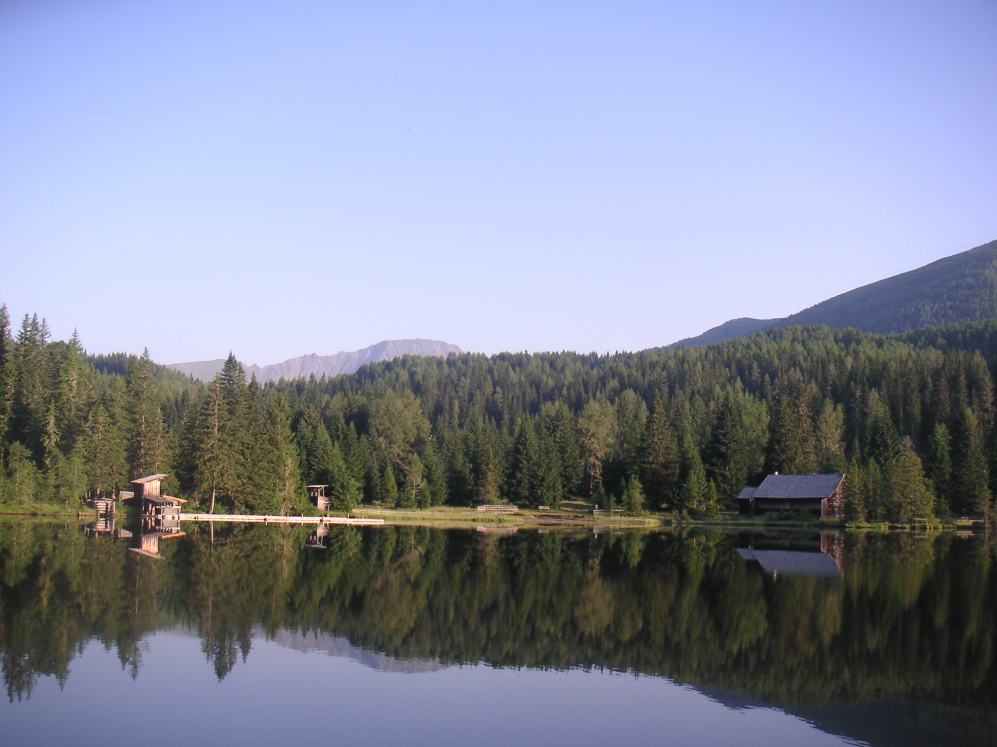 Prebersee mit Schießstand / Niedere Tauern / Österreich